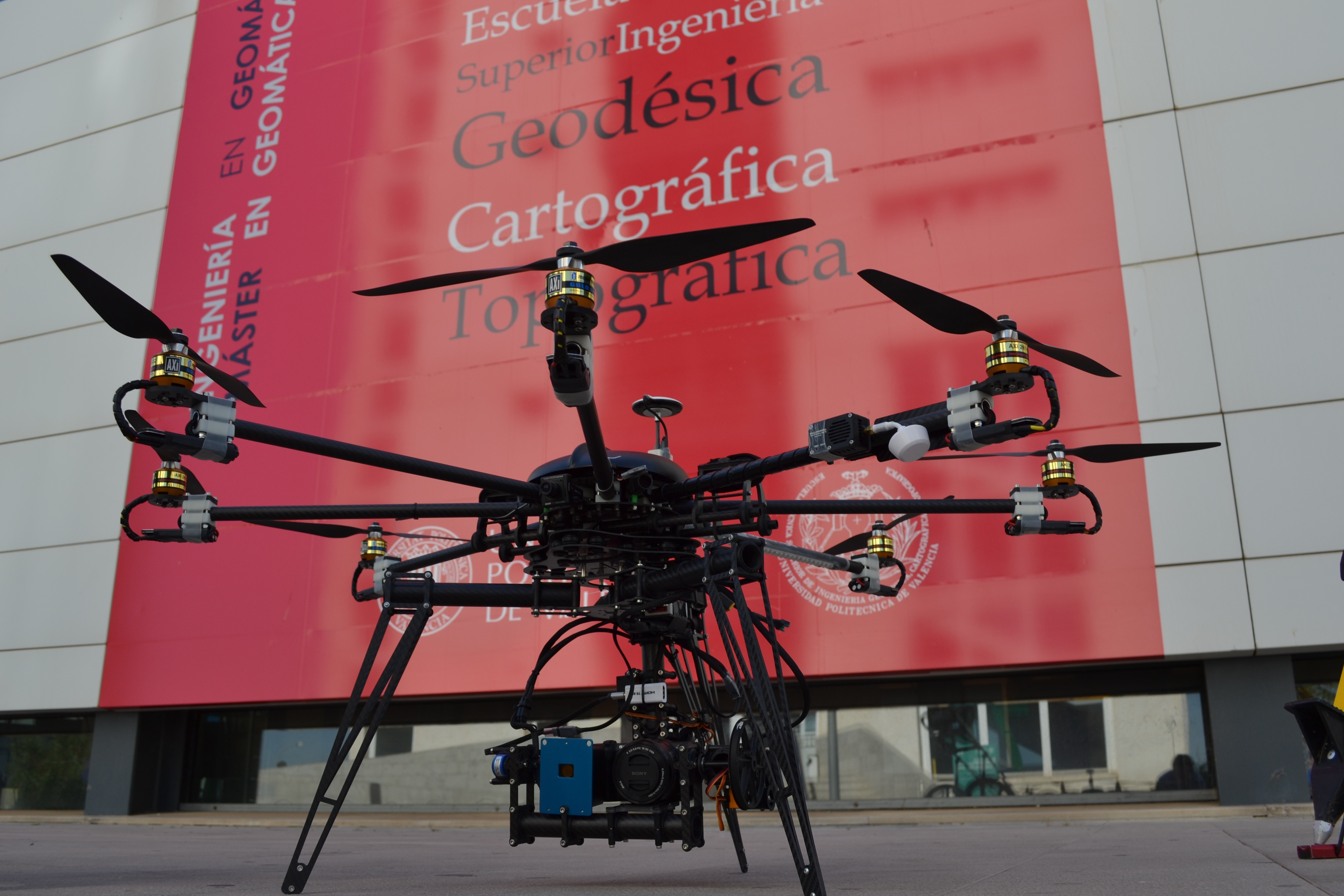 Dron en fachada de la Escuela de Geomática de Valencia, la ETSI Topográfica, Geodésica y Cartográfica UPV